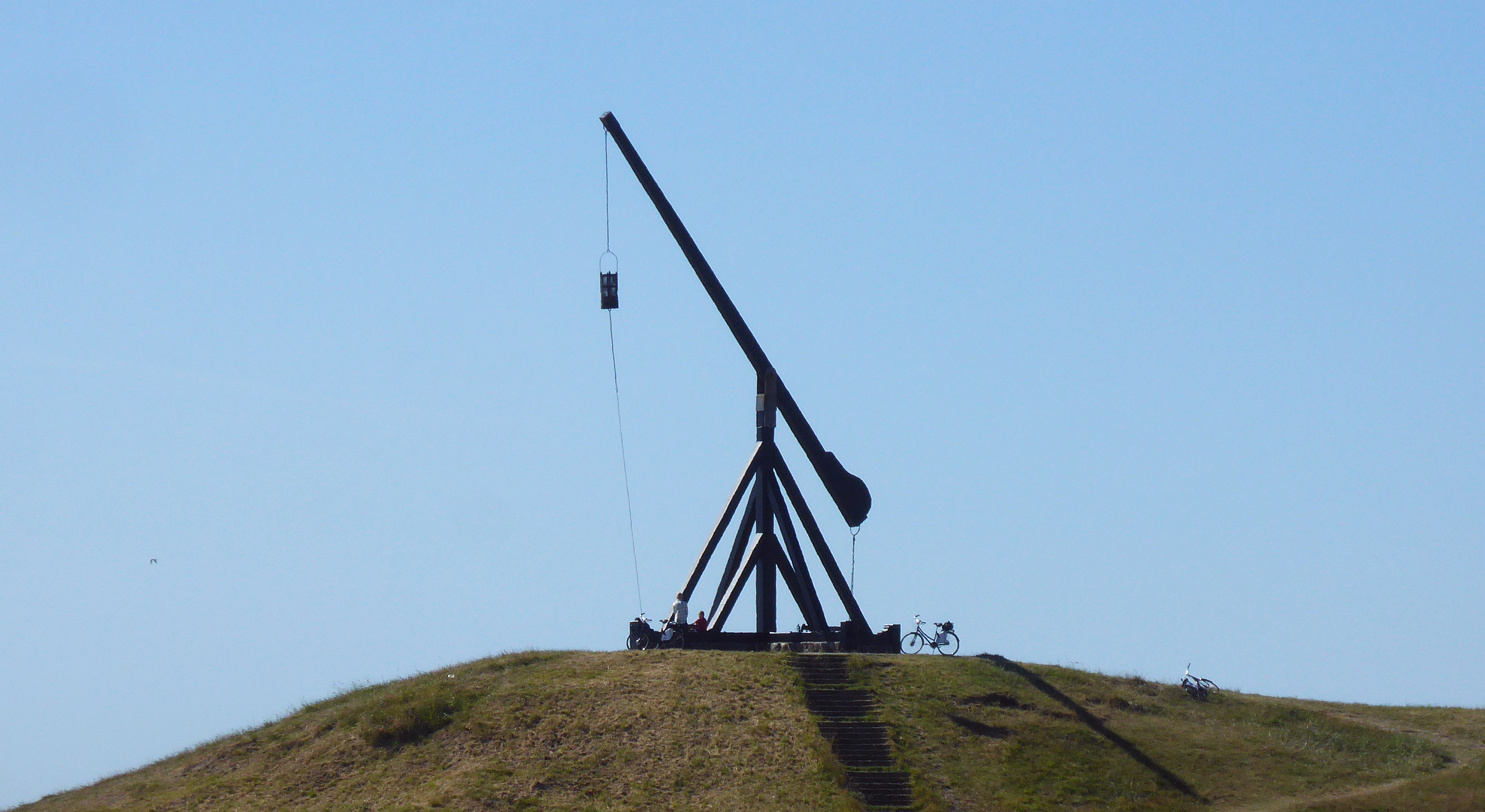 Konstruktion des Vippefyret als Vorläufer vom Leuchtturm in den Jahren 1627 bis 1747, heute Kopie mit Standort im Nordosten von Skagen am Ostsee-Ufer - Foto 2018 Wolfgang Pehlemann P1220422.jpg